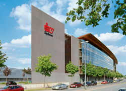 Hauptsitz der Sparkassen-Versicherung Sachsen in "An der Flutrinne" in Dresden